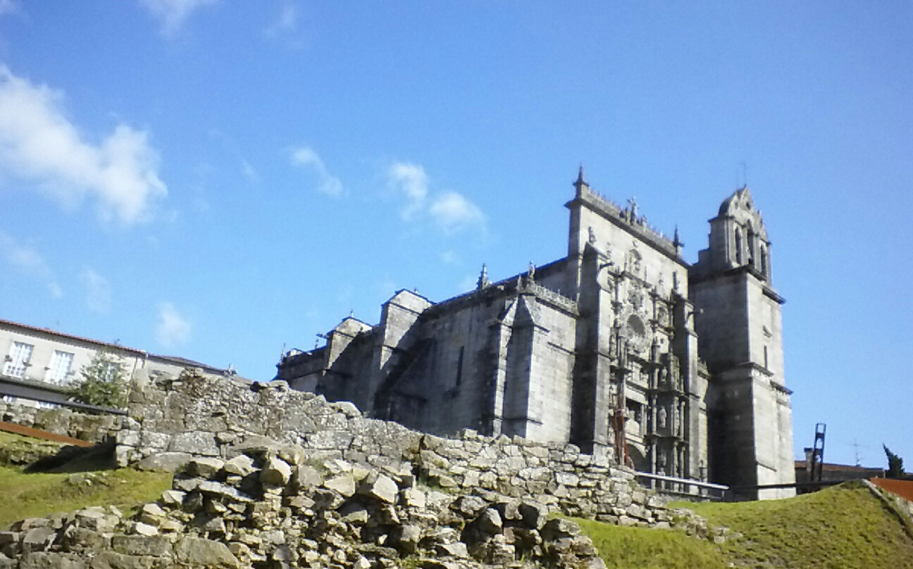 Restos de la muralla medieval delante de la Basílica de Santa María la Mayor en Pontevedra capital